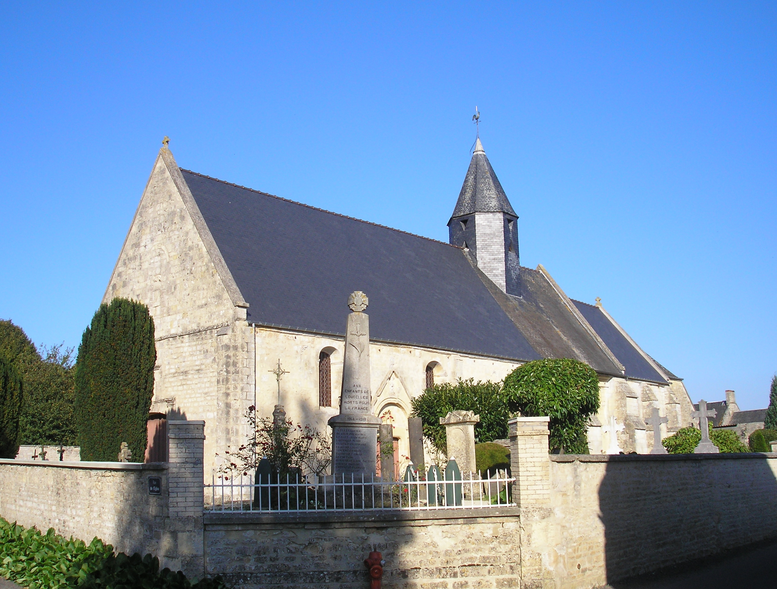 Loucelles (Normandie, France). L'église Notre-Dame.